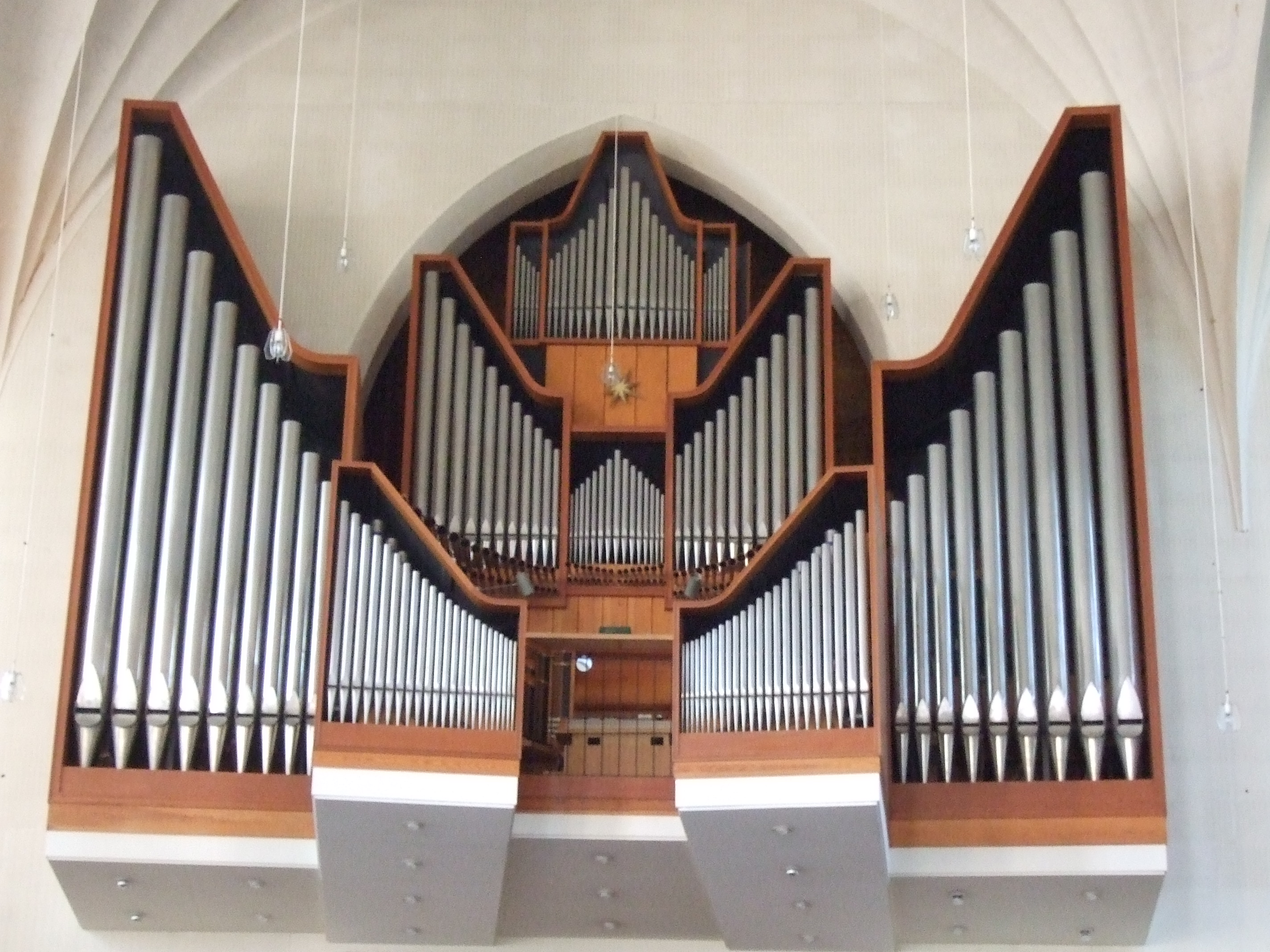 Orgel der Martinskirche Kassel